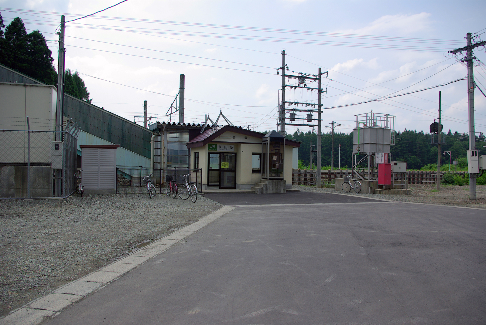 JR奥羽本線泉田駅